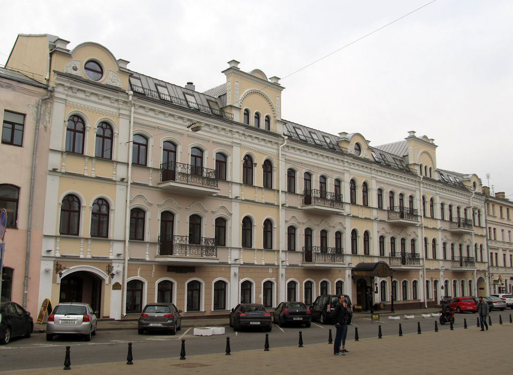 Мінск. Вуліца Інтэрнацыянальная, 11